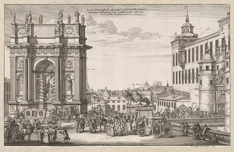 Titel Arcus Triumphalis, gloriose confecto bello Danico, Invictissimo Augustissimoque Regi Carolo XI reduci, erectus a civitate Stockholmiense Titel i översättning Triumfbåge, som efter danska krigets lyckliga slut restes åt den återvändande segerrike och store konungen Karl XI av Stockholms stad